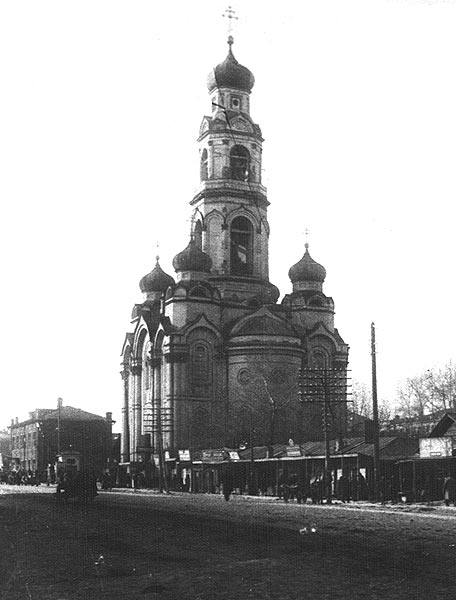 Вид на Большой Златоуст от Каменного моста